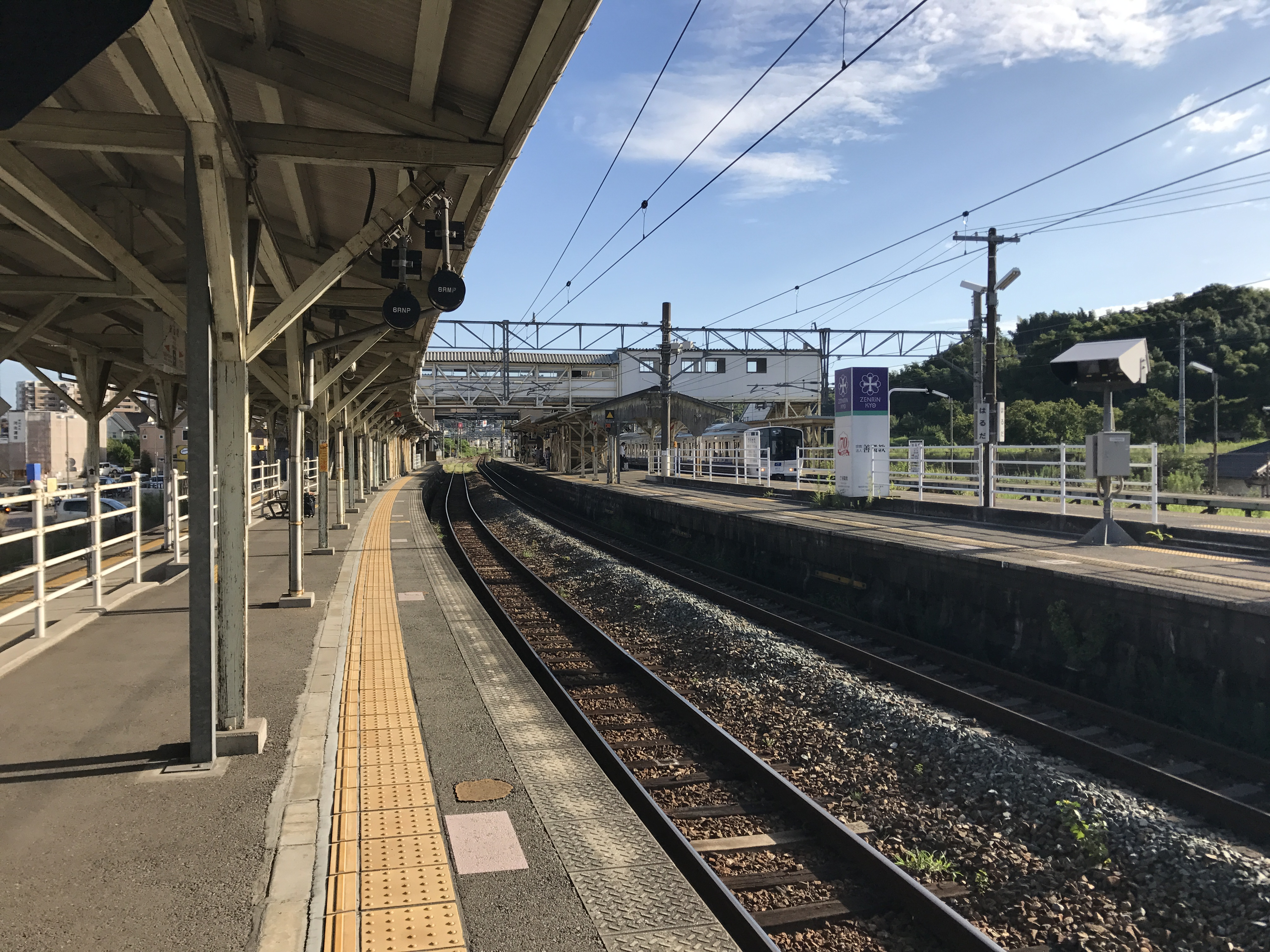 原田駅のホーム(奥はけやき台方面)